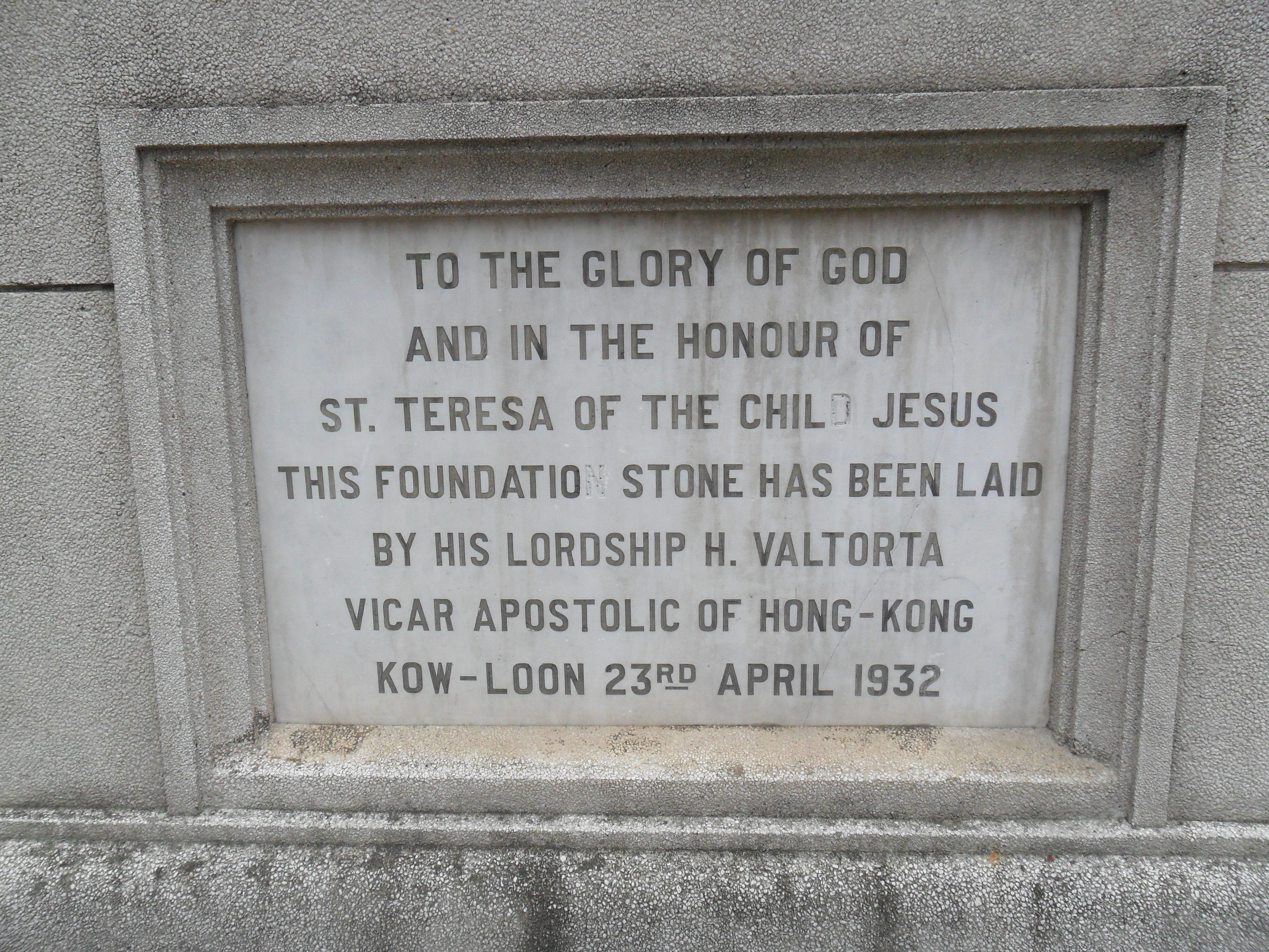 中文（香港）: 聖德肋撒堂, 香港, 中國